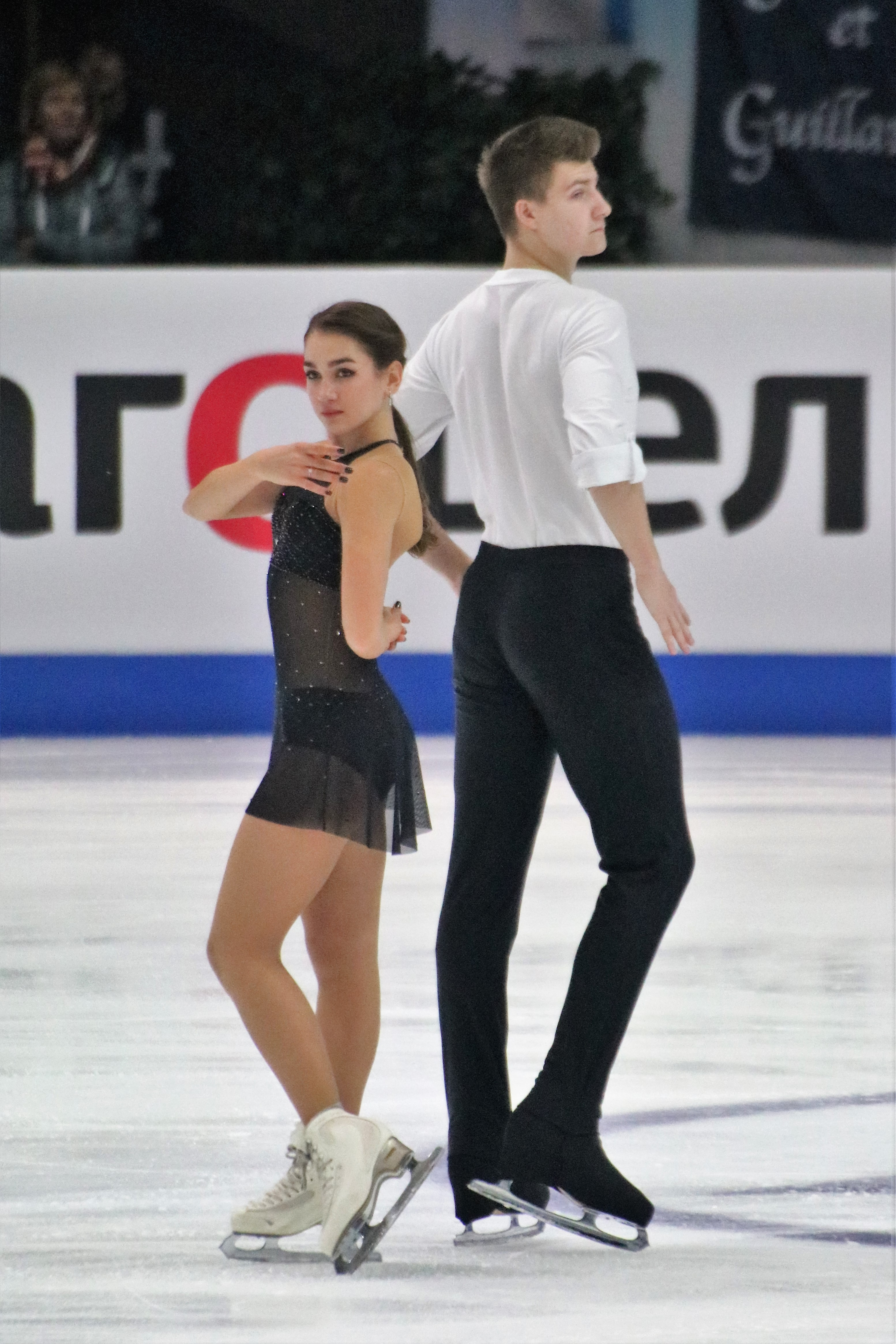 София Нестерова и Артём Даренский (Украина) на чемпионате Европы по фигурному катанию 2020